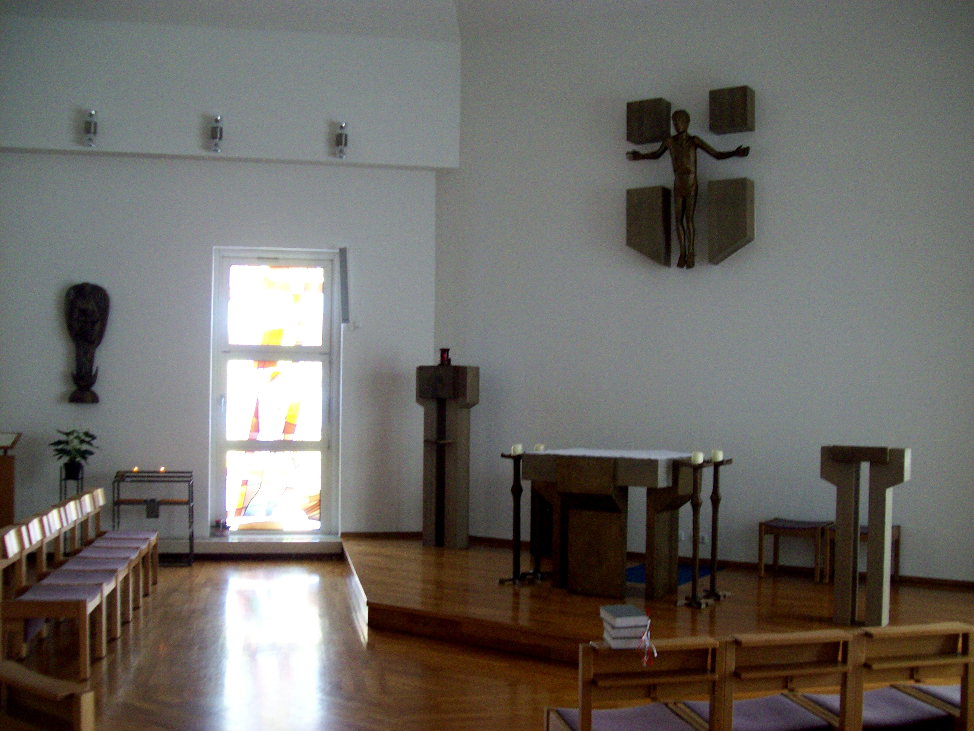 Altar, Ambo, Tabernakel Kreuz und Madonna in der Kapelle im Klinikum Aschaffenburg, geschaffen 1989 von Willibald Blum